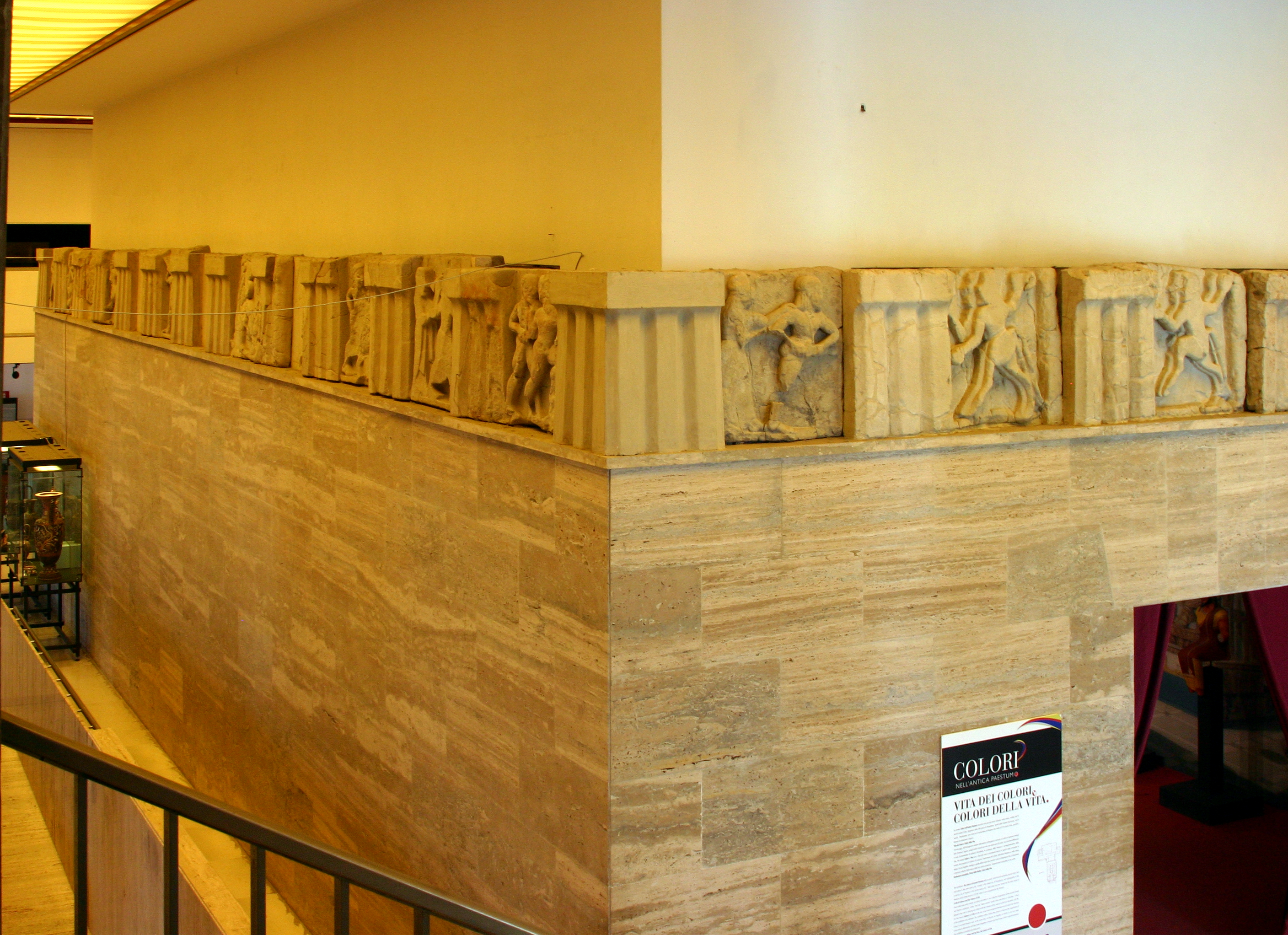 Museo archeologico nazionale - Paestum